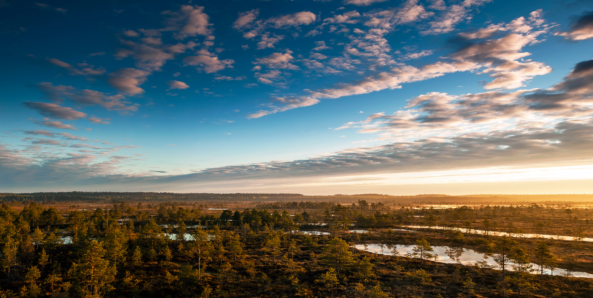 Vaade Kõnnu Suursoo vaatetornist põhja, Põhja-Kõrvemaa looduskaitseala